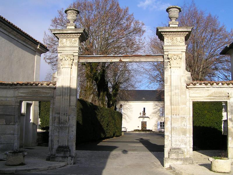 mairie de Bassac